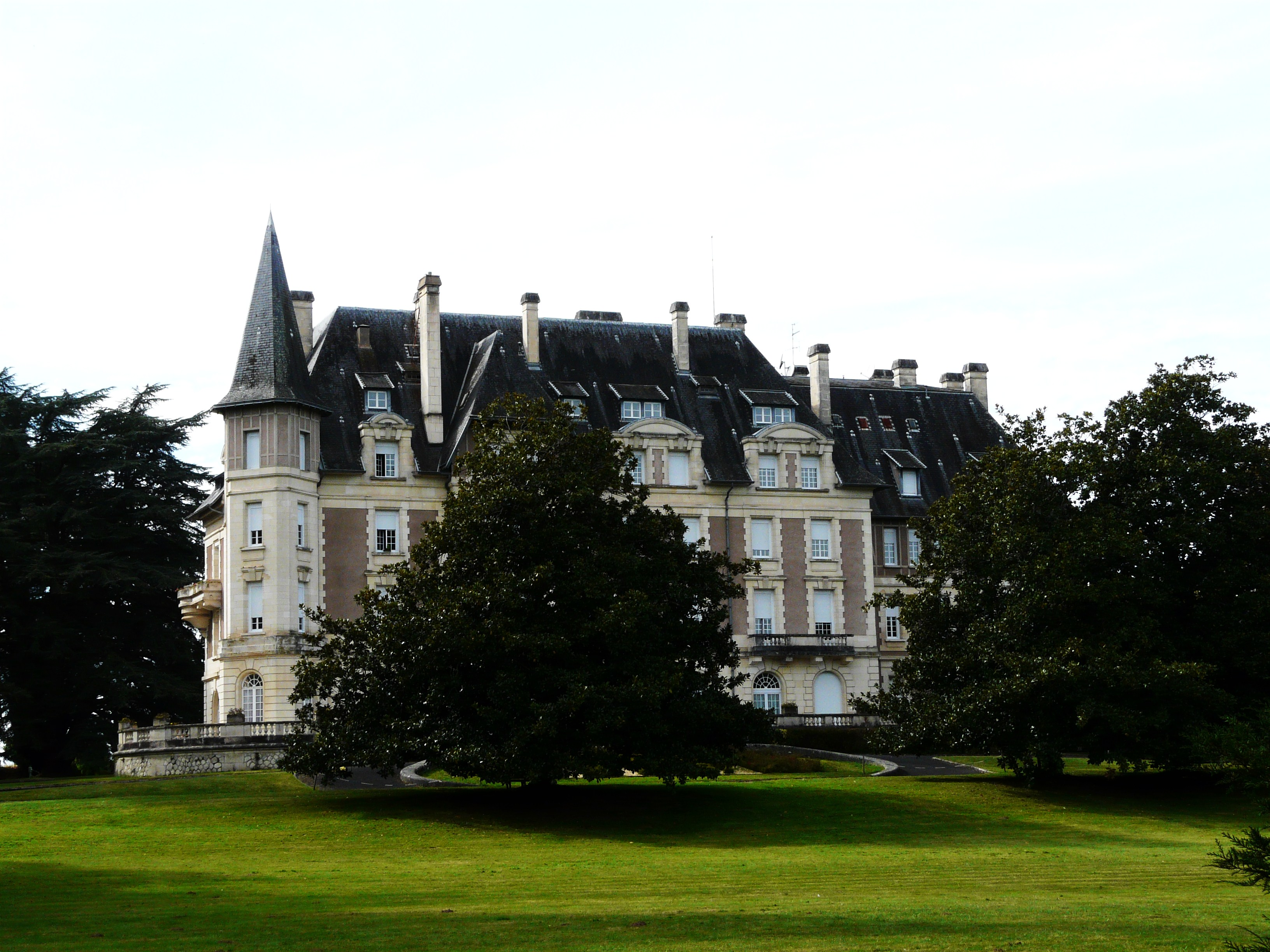 Le château de Bassy, Saint-Médard-de-Mussidan, Dordogne, France